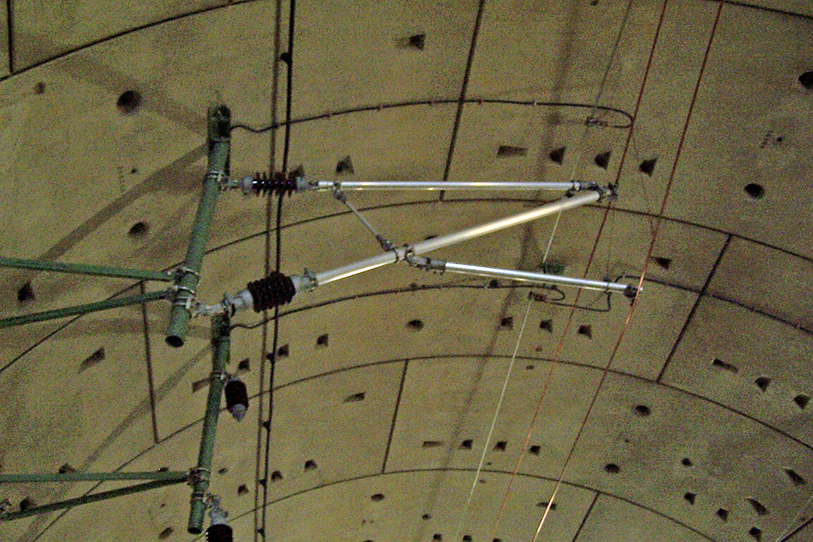 Ausleger und Stützpunkt der Oberleitung im Katzenbergtunnel